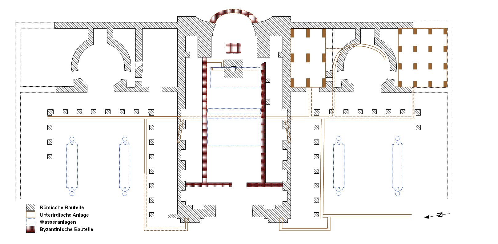 Grundriss der Roten Halle in Pergamon